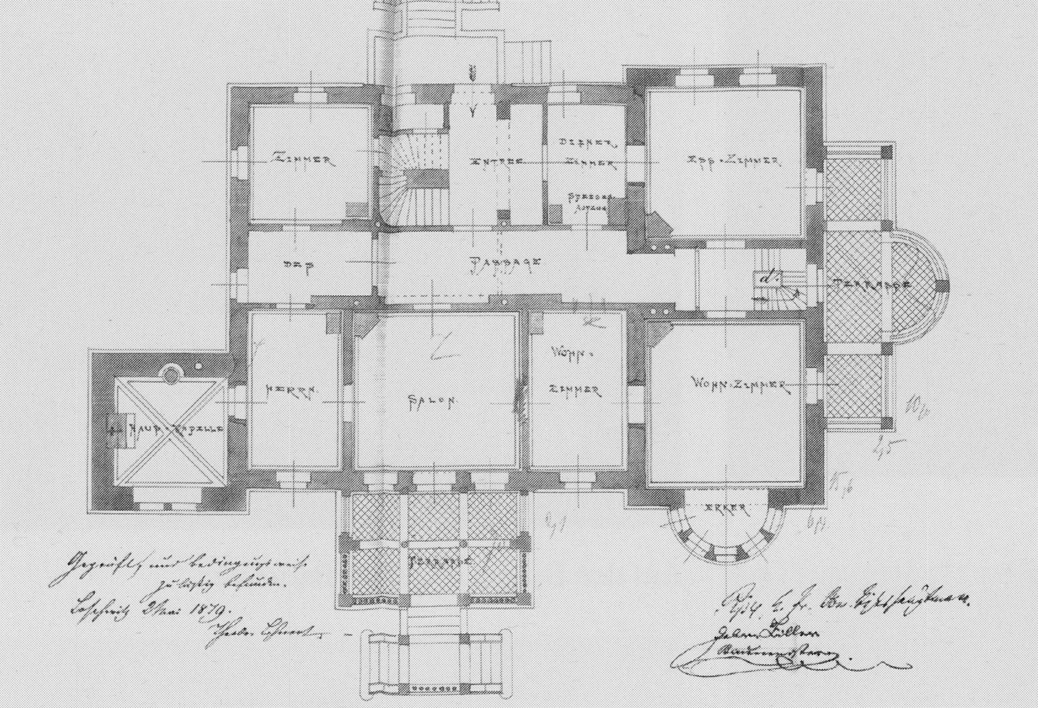 Radebeul Wettinhöhe Grundriss 1879